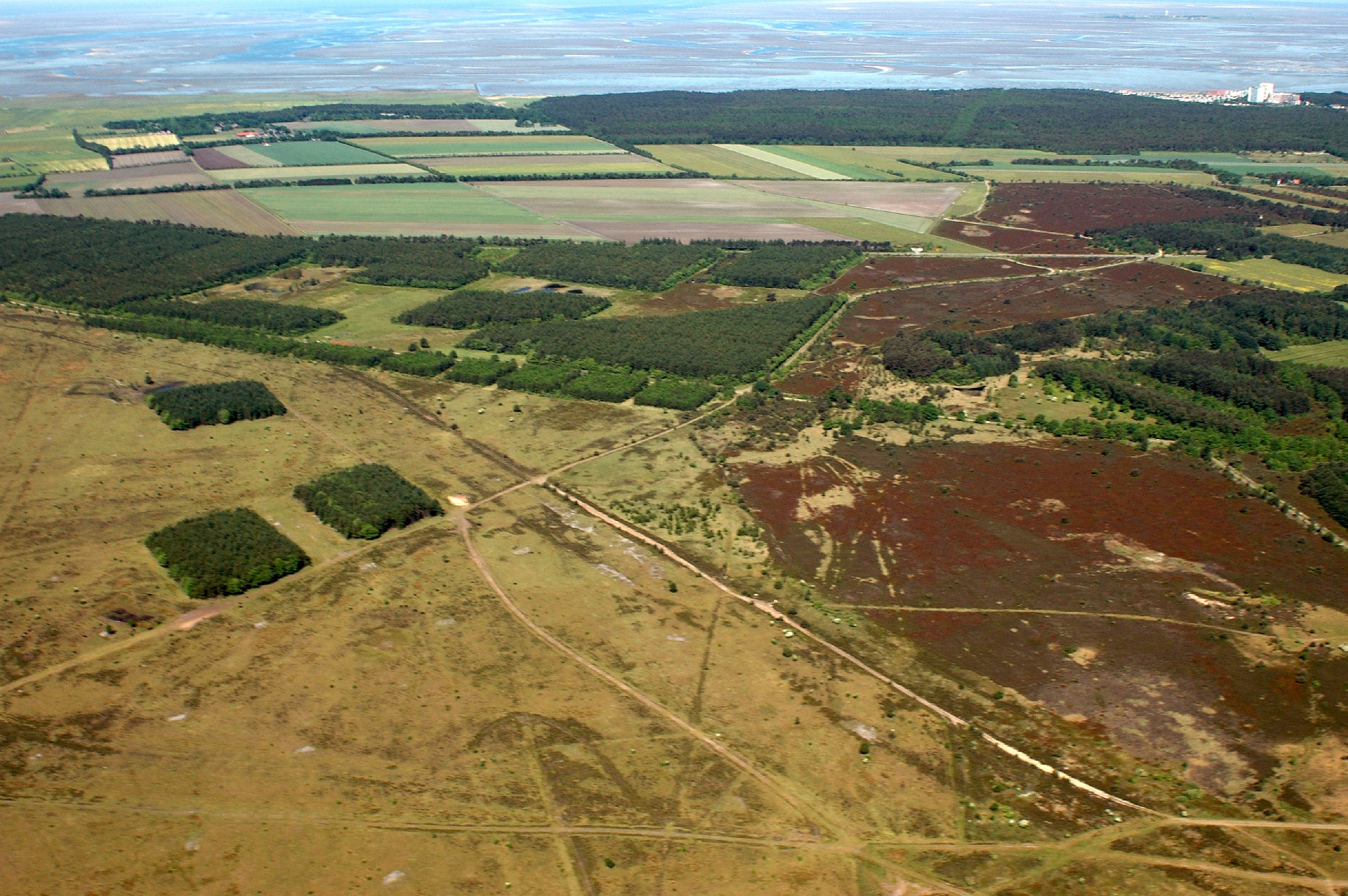 Küstenheiden und Krattwälder bei Cuxhaven (Fotoflug vom Flugplatz Nordholz-Spieka über Cuxhaven und Wilhelmshaven)